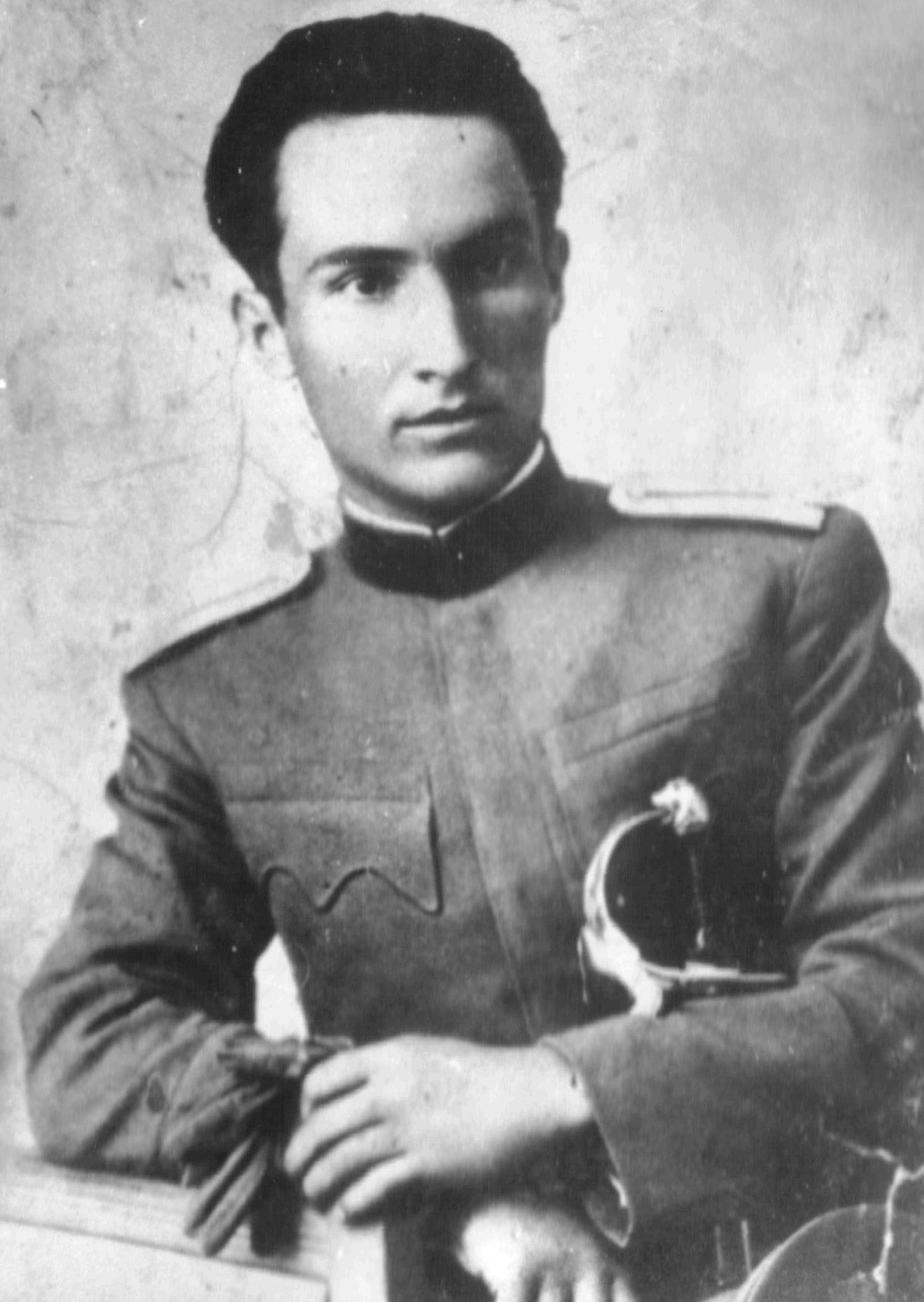 Srpski (latinica): Momir Pucarević (Drmanovići, kod Nove Varoši, 1918 — Livno 6. jul 1942), učesnik Narodnooslobodilačke borbe i narodni heroj Jugoslavije.